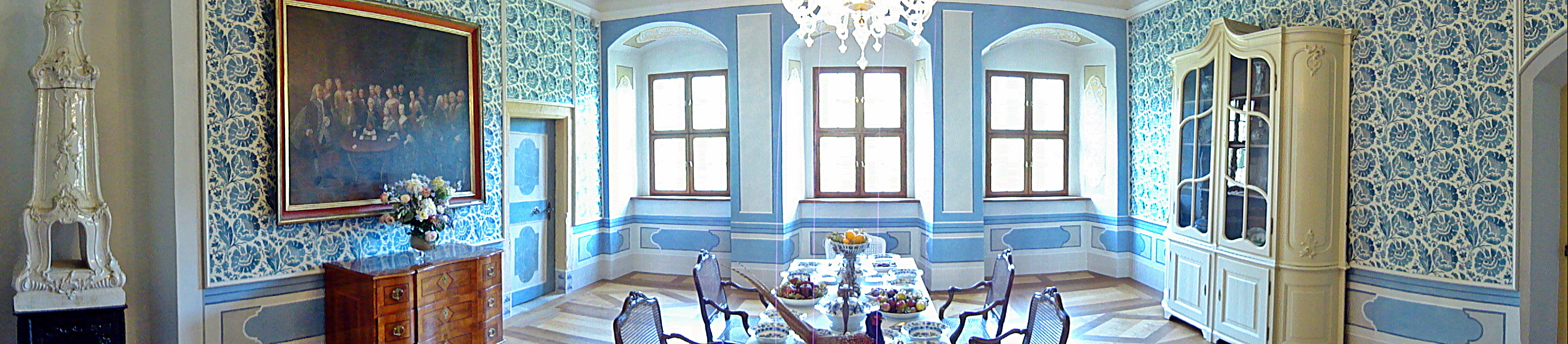 Tafelgemach (Schloss Delitzsch)